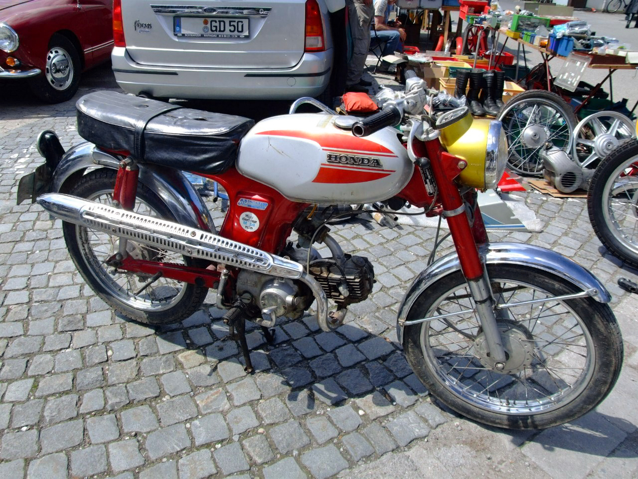 Honda SS50M 1970